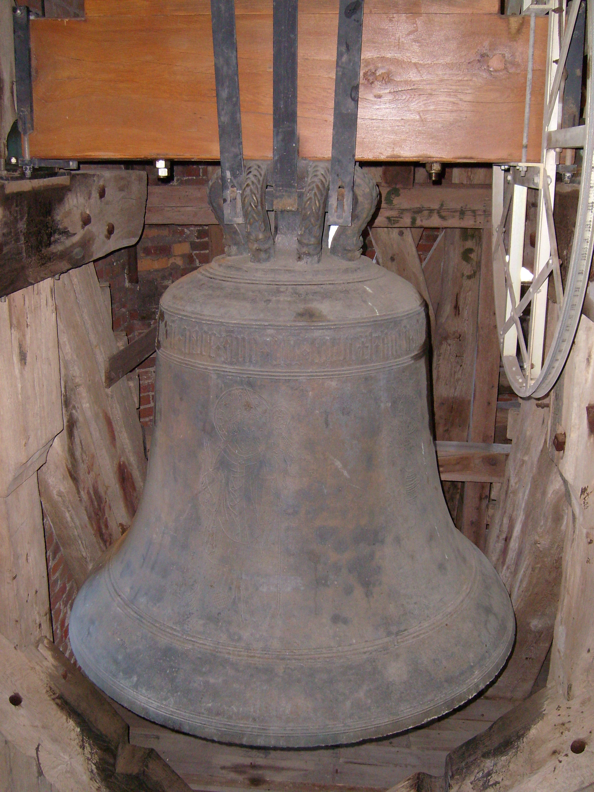 Greifswald, Dom St. Nikolai: Große Bet- und Professorenglocke, Rickert de Monkehagen, 1440, Schlagton c1, Ø 1810 mm, 4020 kg.